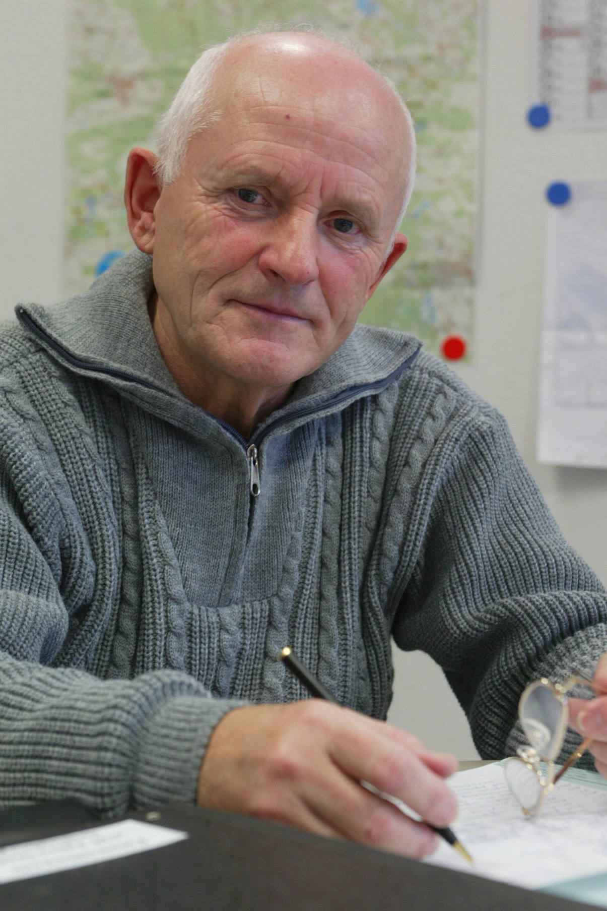 Werner Forkert am 9. Januar 2004